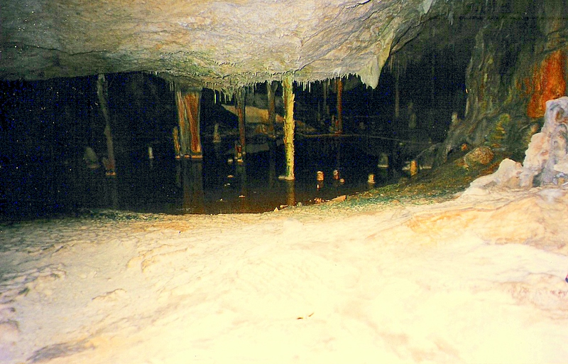 Coves de Marçà